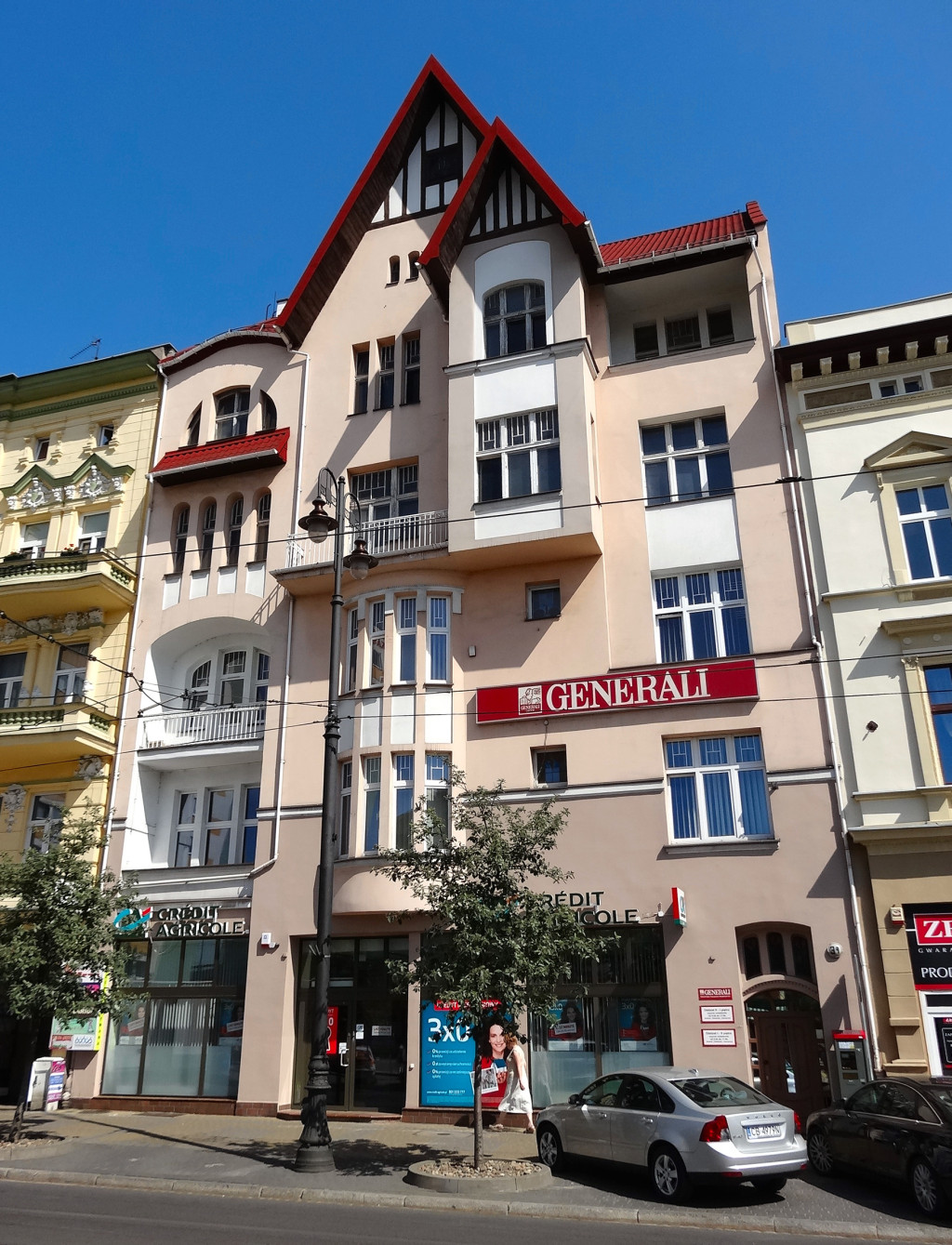 Kamienica przy ul. Gdańskiej 34 w Bydgoszczy